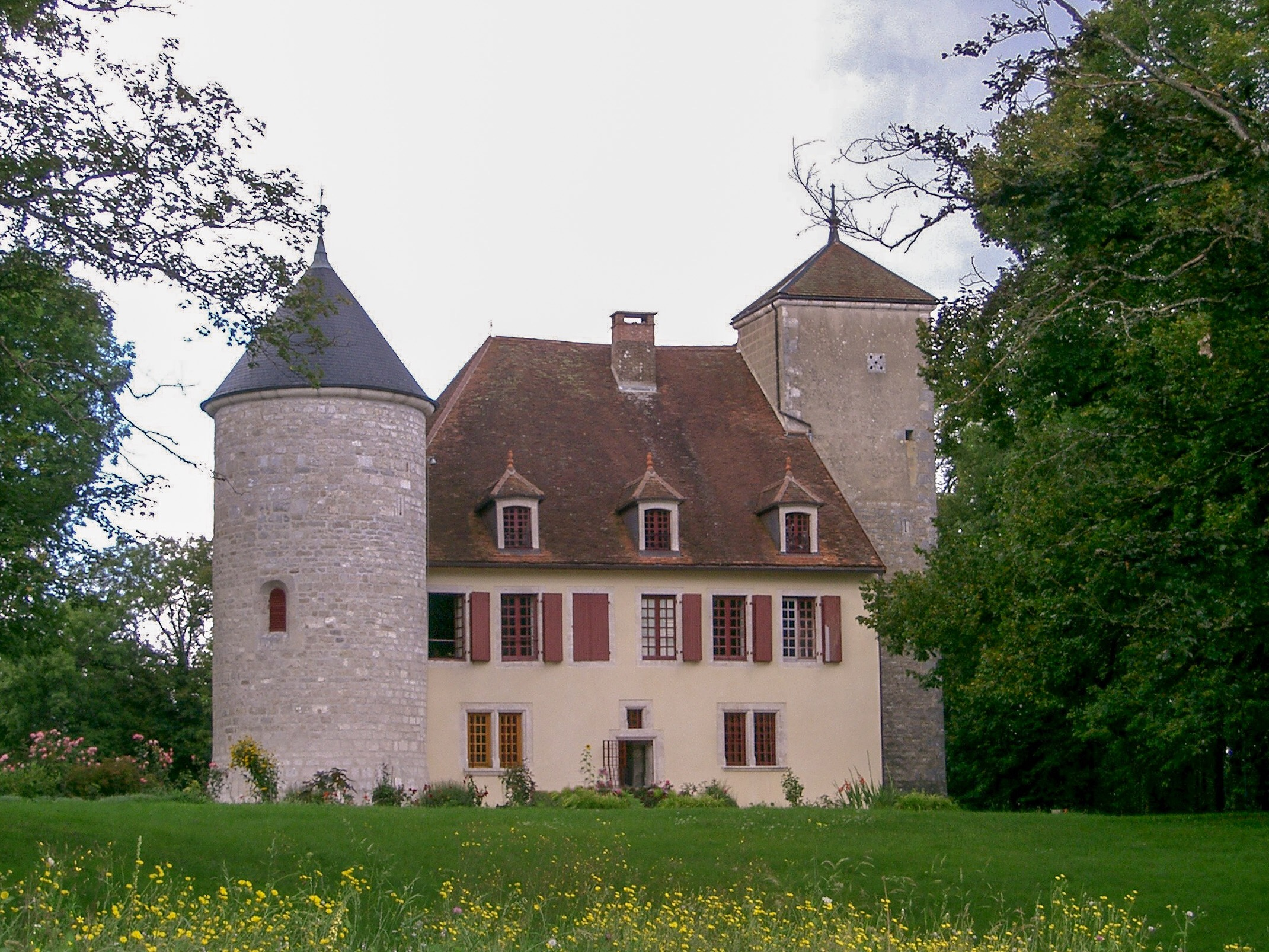 Maisod (Jura - France) - château du XVIe siècle